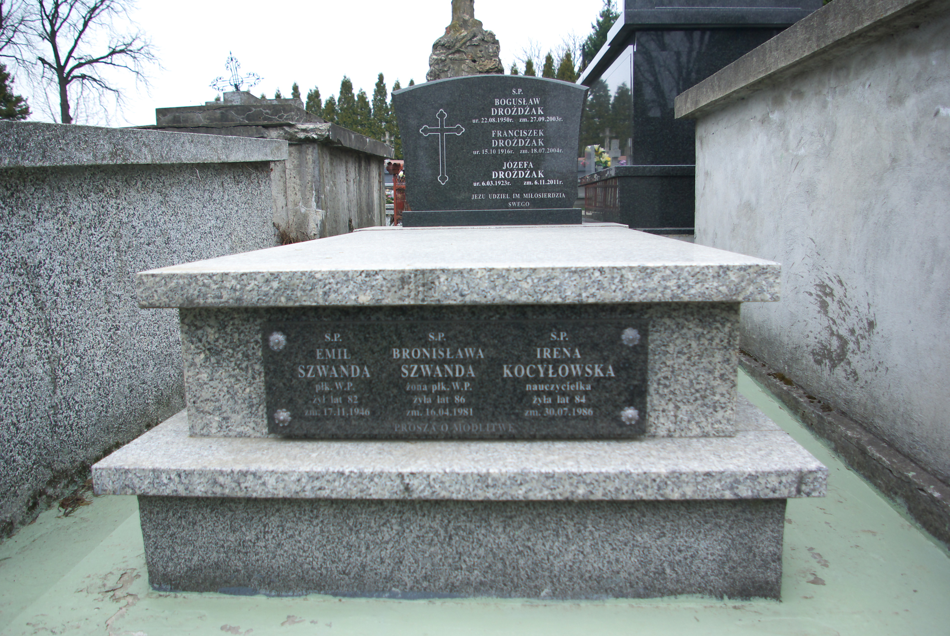 Grobowiec rodzin Drożdżak i Szwanda na Cmentarzu Centralnym w Sanoku